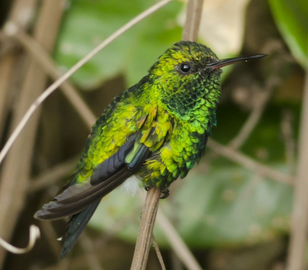 Chlorostilbon gibsoni macho